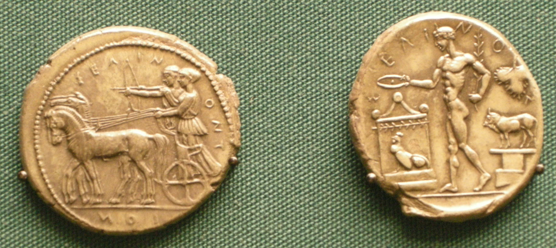 Monete d'argento di selinunte, 450 ac. circa